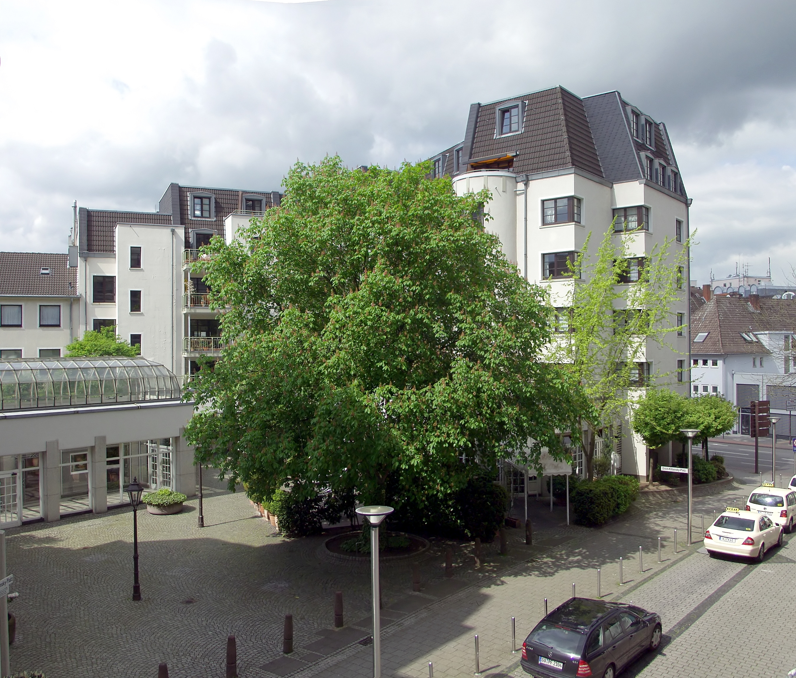 Erich-Klibansky-Platz, Köln